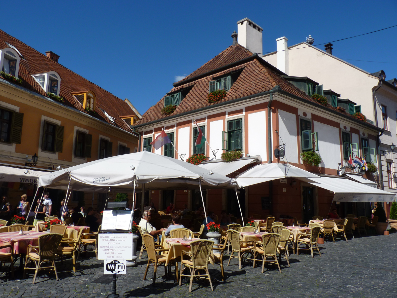 Szenátor-ház (Eger, Dobó tér 11.) This is a photo of a monument in Hungary, Identifier: 5483